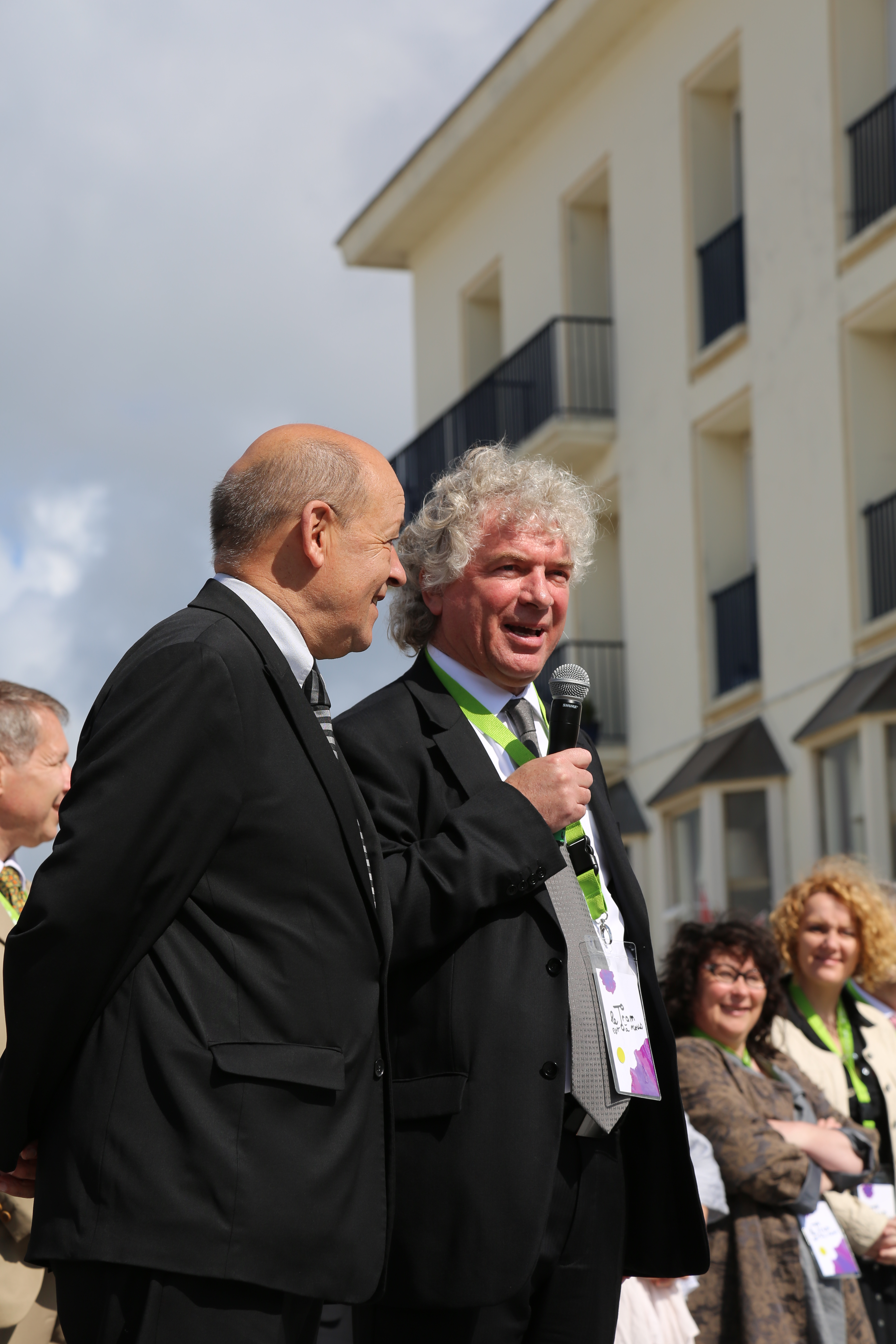 Photos autour de l'inauguration du Tramway à Brest le 23 juin 2012